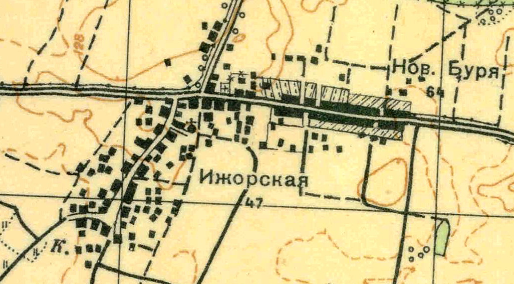 Топографическая карта Ленинградской области, квадрат О-35-11-Г-г (Муховицы), деревня Новая Буря.